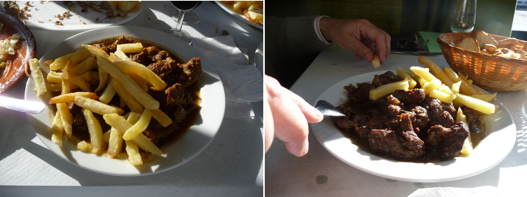 Algar-Raciones-VenaoYJabali.jpg